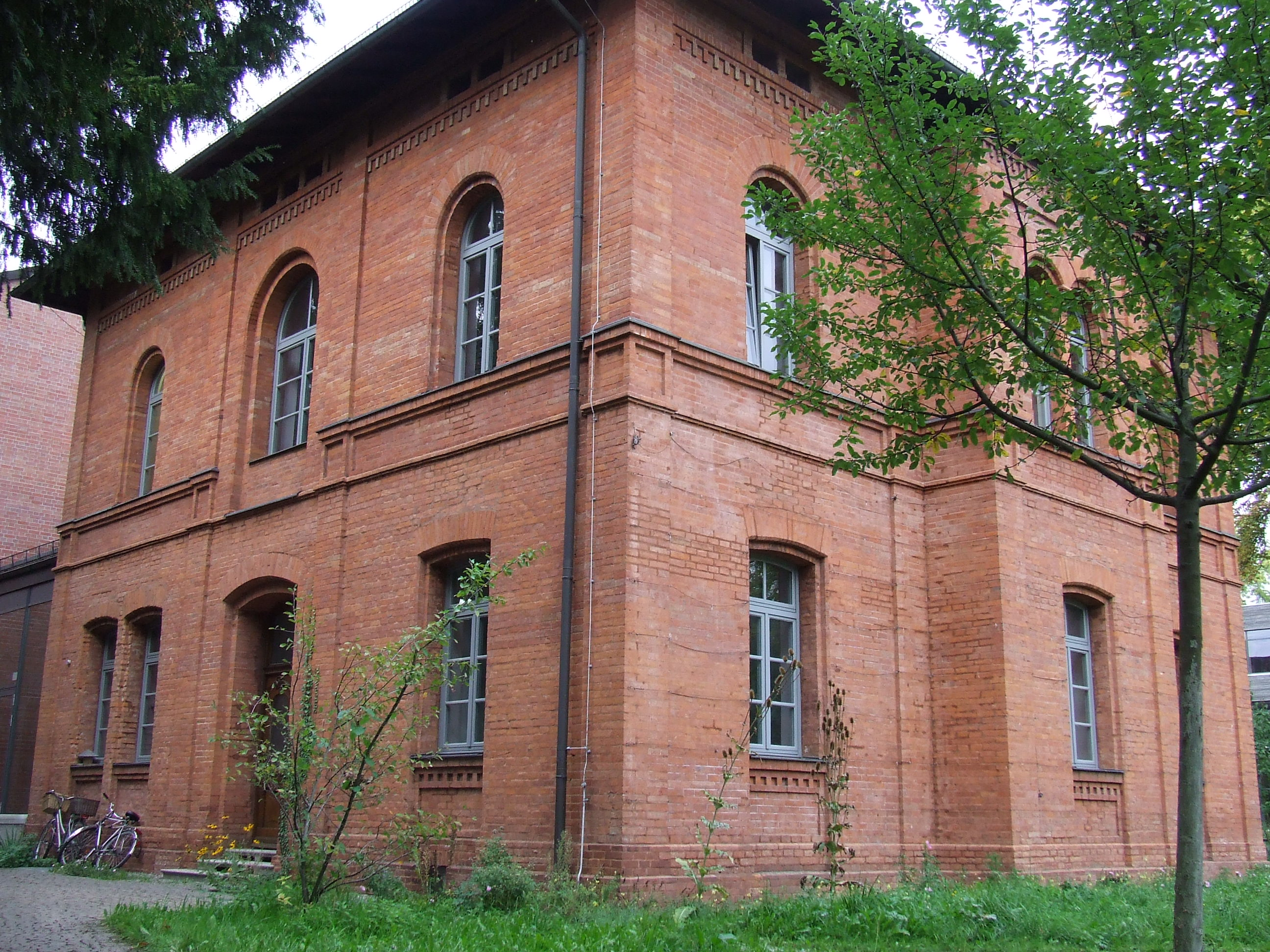 Ansicht von Südwesten